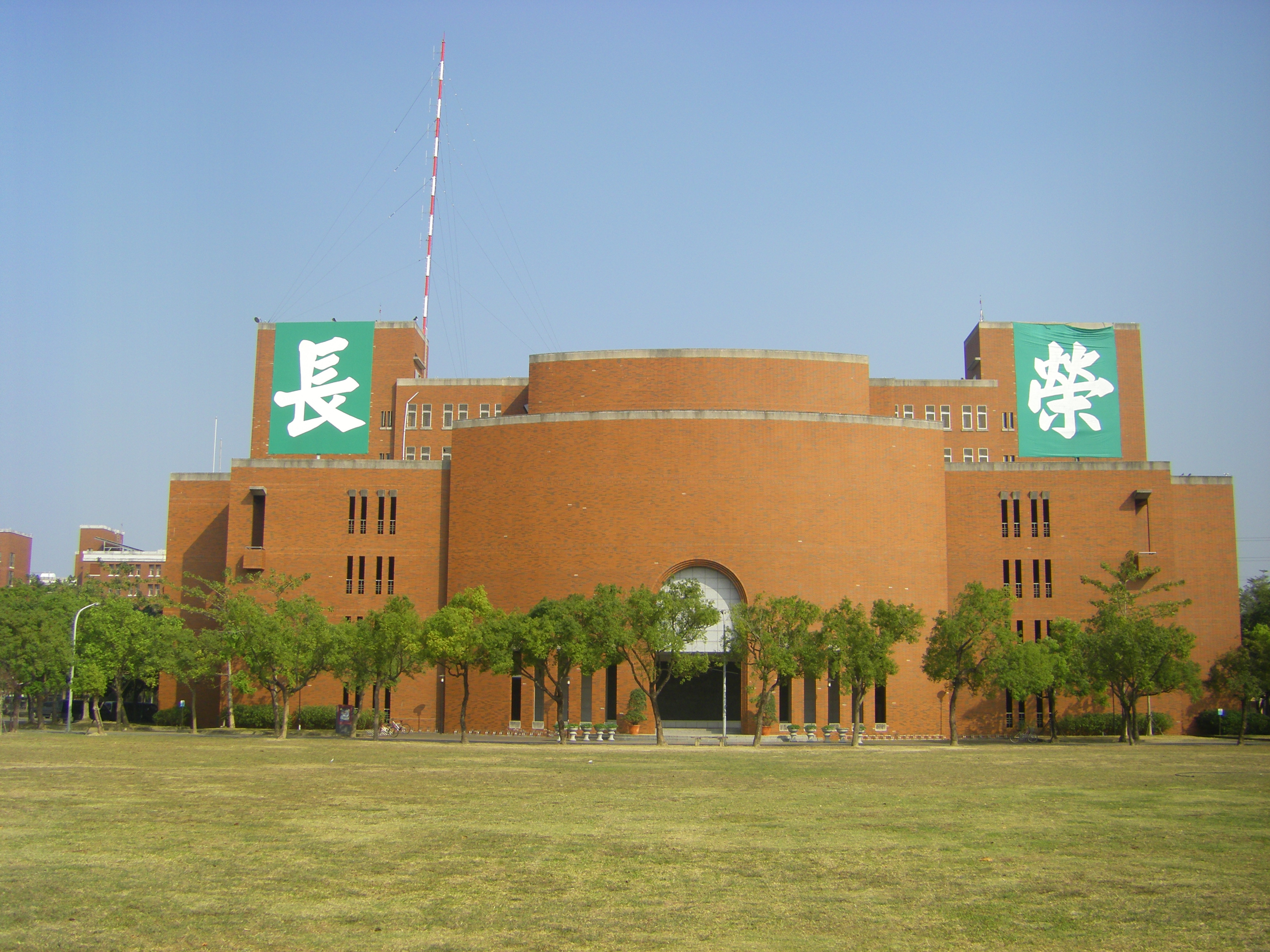 中文（台灣）: 長榮大學第二教學大樓